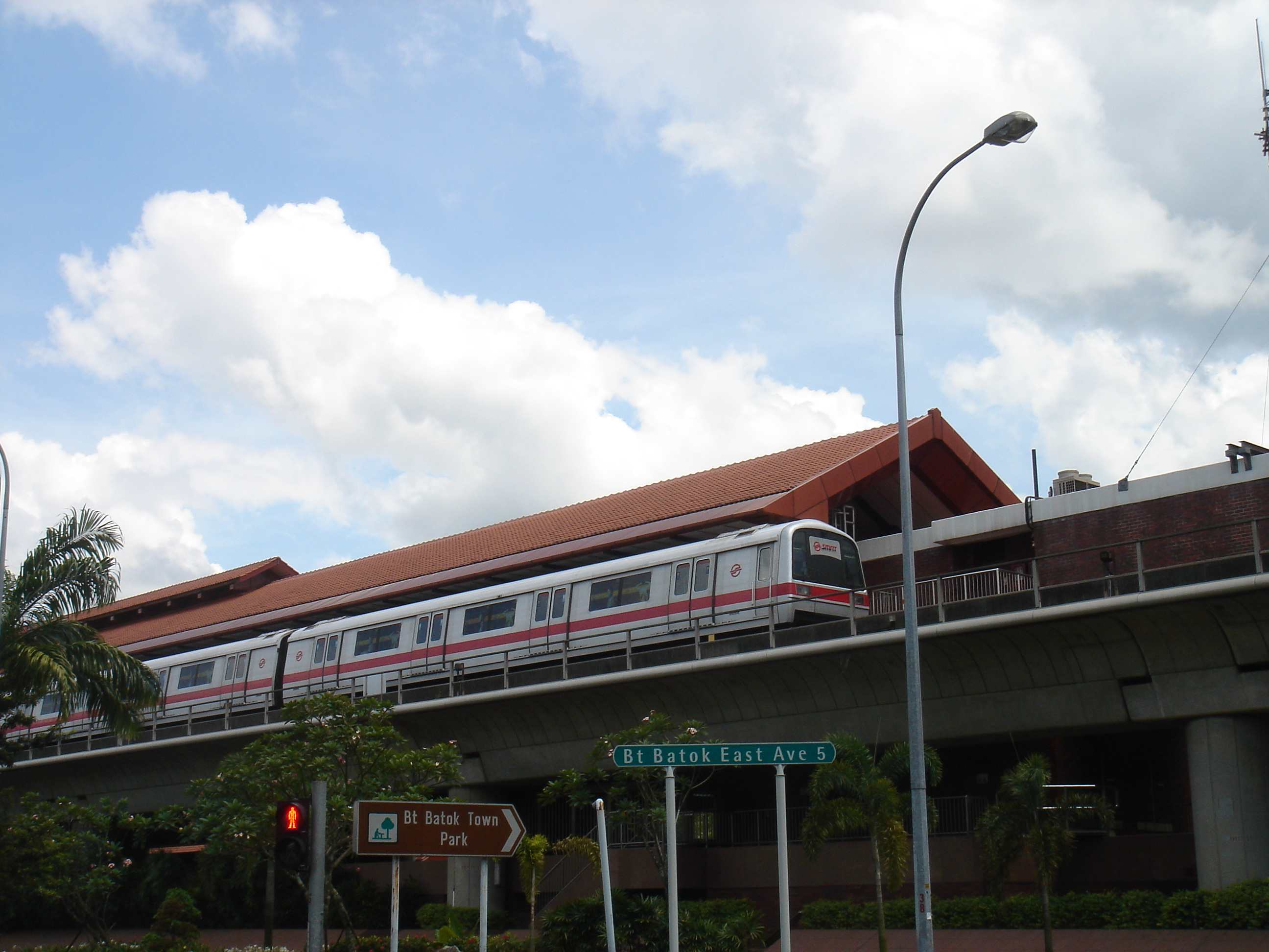 Bukit Gombak MRT Station, Bukit Gombak, Singapore.